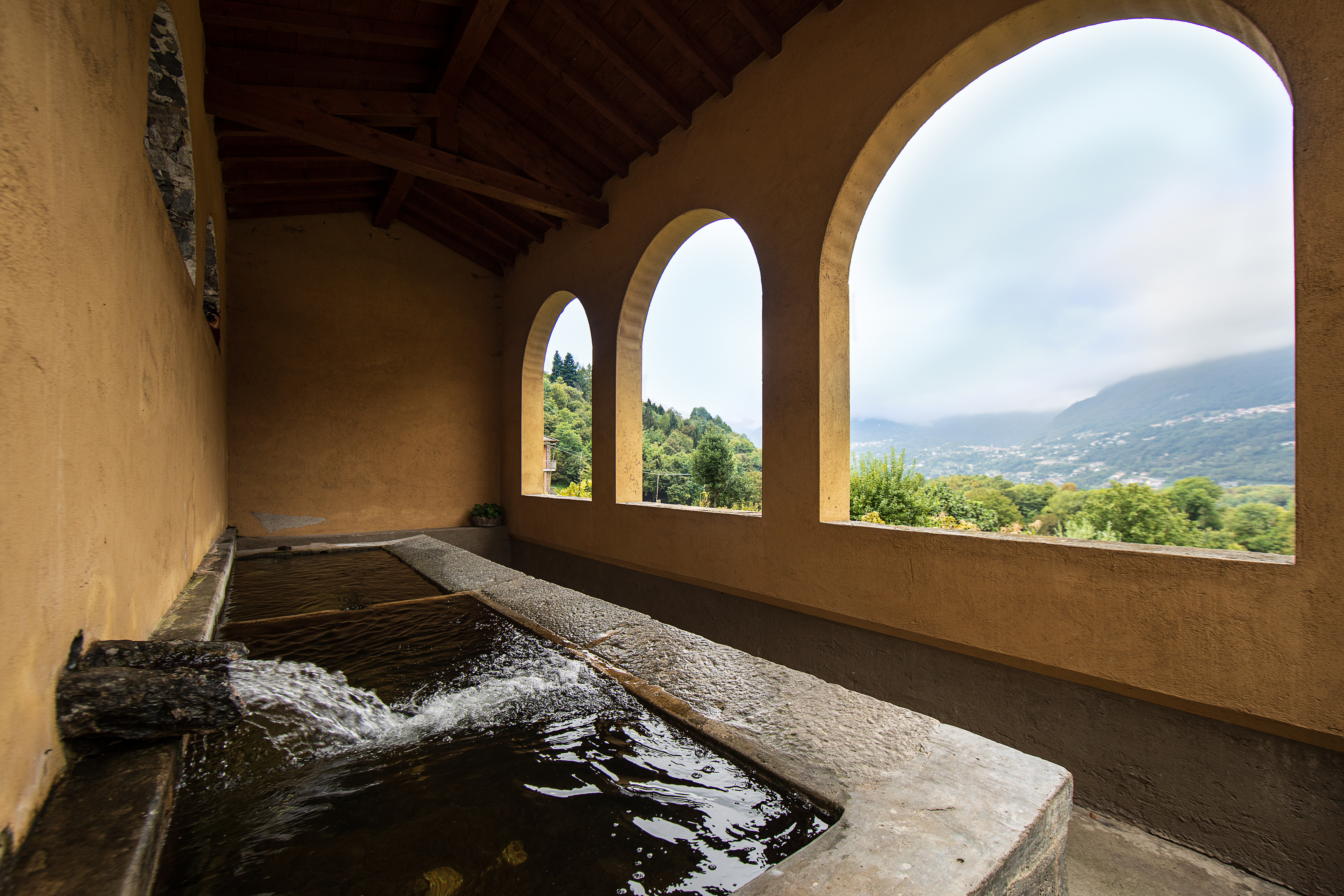 Cimitero comunale This is a photo of a monument which is part of cultural heritage of Italy.